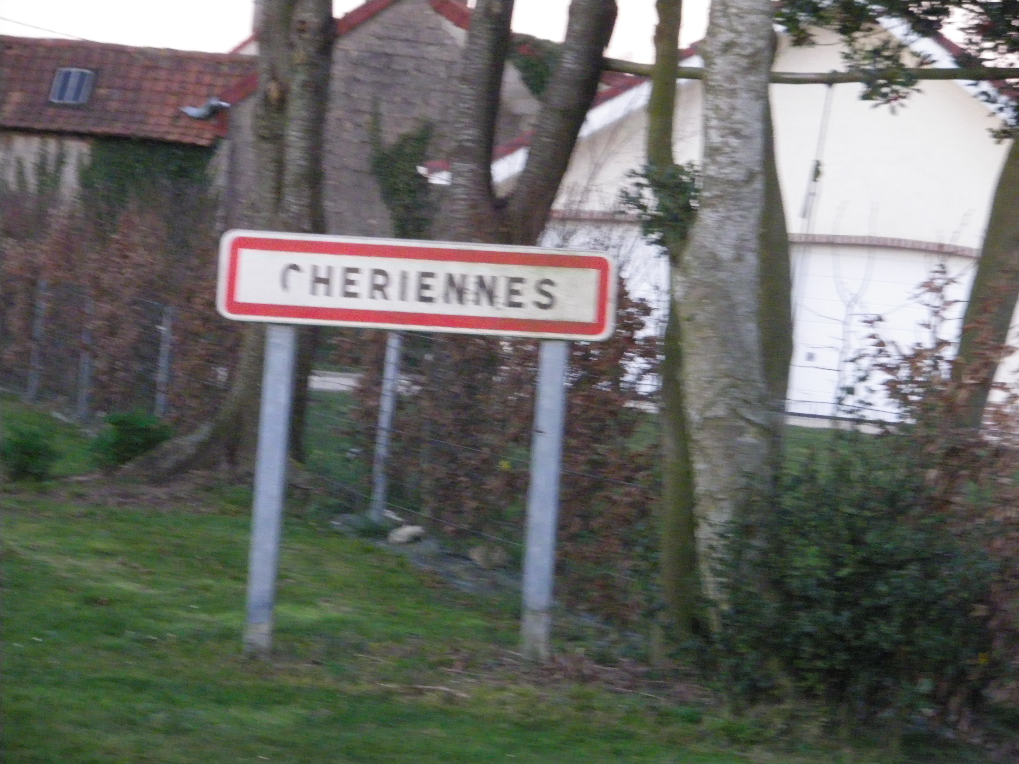 Panneau d'entrée de la commune de Chériennes.